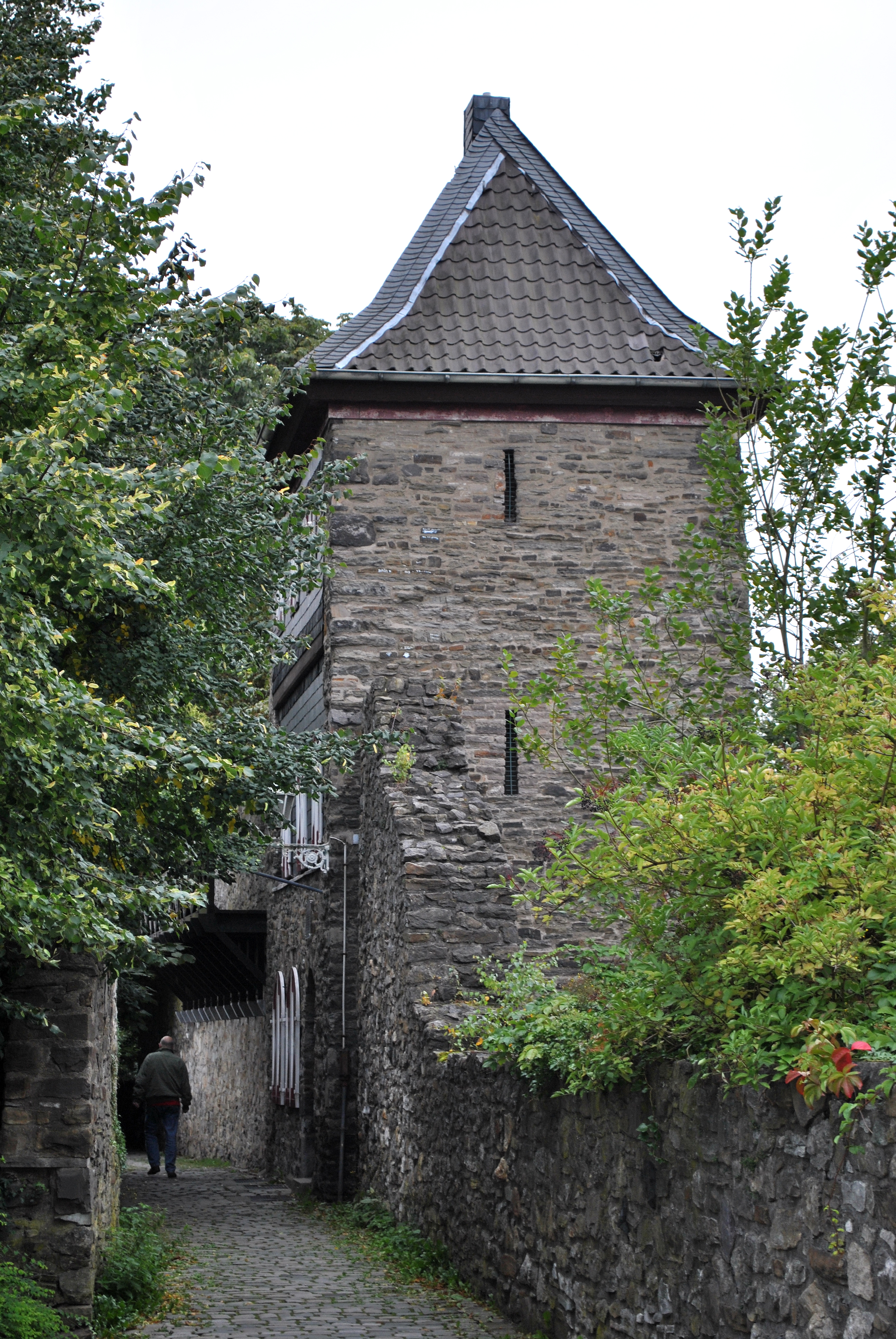 „Trinsenturm“ und Wehrgang der Stadtmauer von Ratingen (gegen Süd)